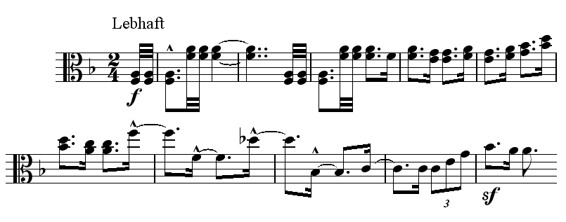 Les premières mesures de la partie d'alto de la deuxième pièces des Märchenbilder pour alto & piano de Robert Schumann